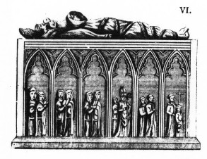 Tombeaux des Enfants dEudes IV de Bourgogne´au Abbaye du Val des Choues